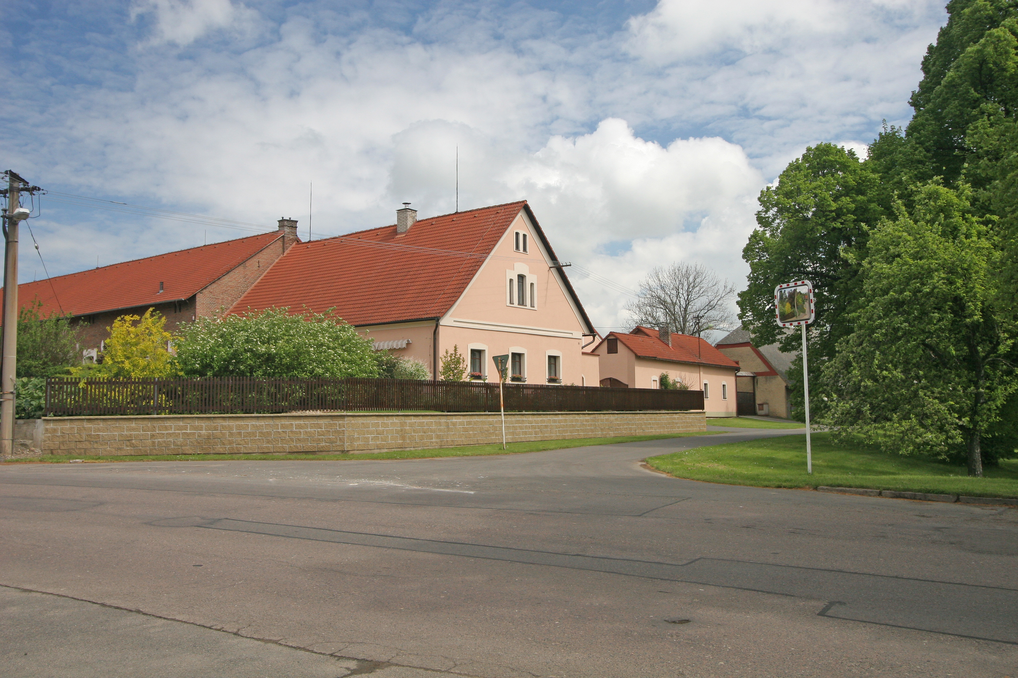 Topol čp. 31